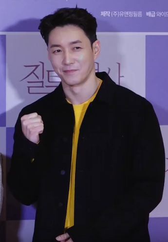 영화 '질투의 역사' 레드카펫 현장의 심형탁